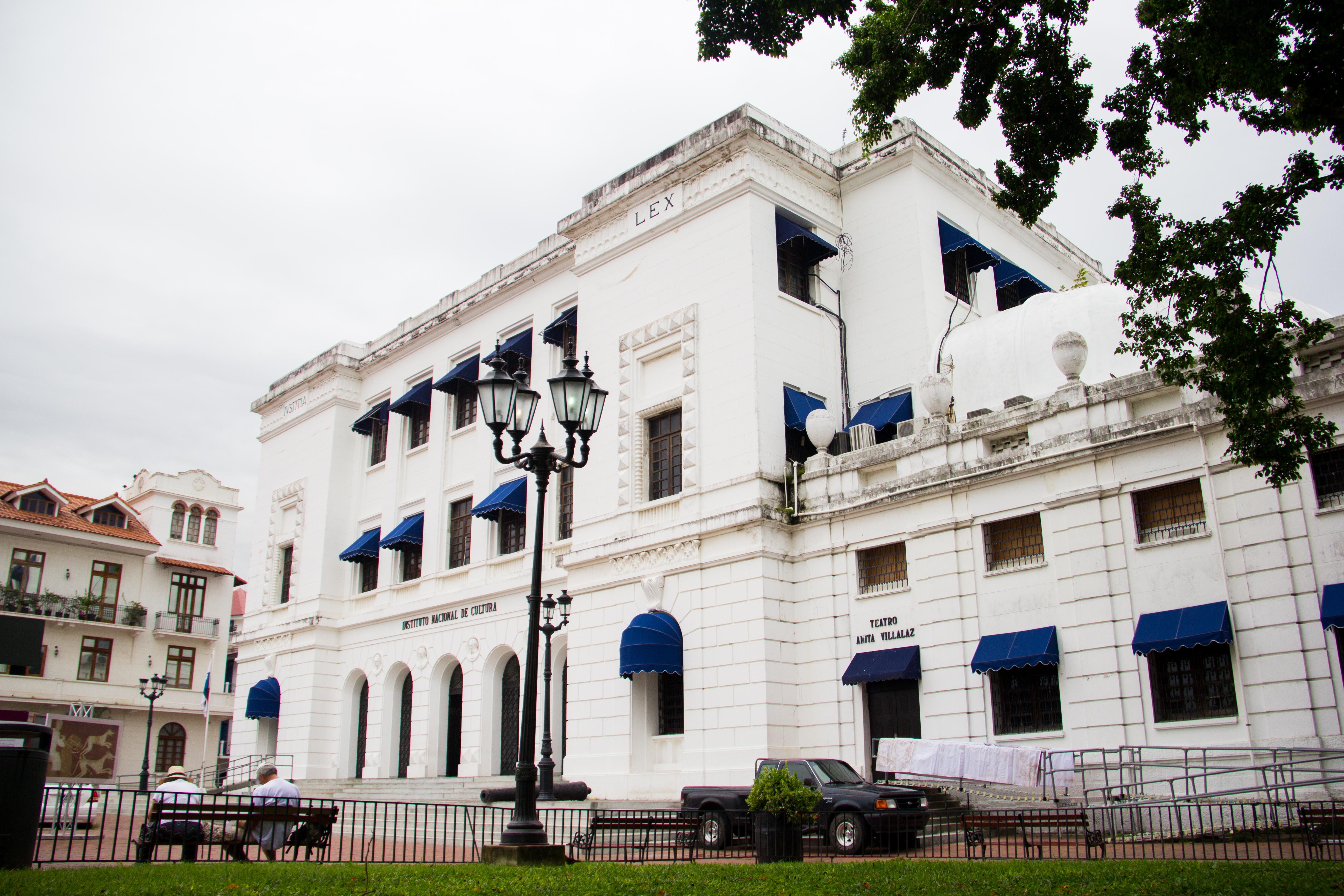 En tiempo de la colonia existió un edificio en este sitio que fue construido en 1705, donde oficiaba la Real Audiencia, la Cárcel de Cortes y el Cuartel Militar de Chiriquí. Este edificio fue inicialmente ideado como el Palacio Legislativo y de Justicia, dando cumplimiento a la ley 35 de noviembre de 1924. Tras la mudanza de la Asamblea en la década de 1950 solo quedó el Palacio de Justicia. En 1993 la Corte Suprema de Justicia se trasladó, y el edificio se convirtió en la sede del Instituto Nacional de Cultura (INAC) y del teatro Anita Villalaz. El Palacio de Justicia fue planeado sobre las restos del cuartel de la Plaza de Francia, y estaba constituido originalmente por una planta baja para albergar la Asamblea Legislativa; un primer piso para la Corte Suprema de Justicia, y un segundo para la Procuraduría General junto con los juzgados.